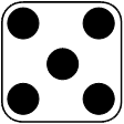 European die face 5